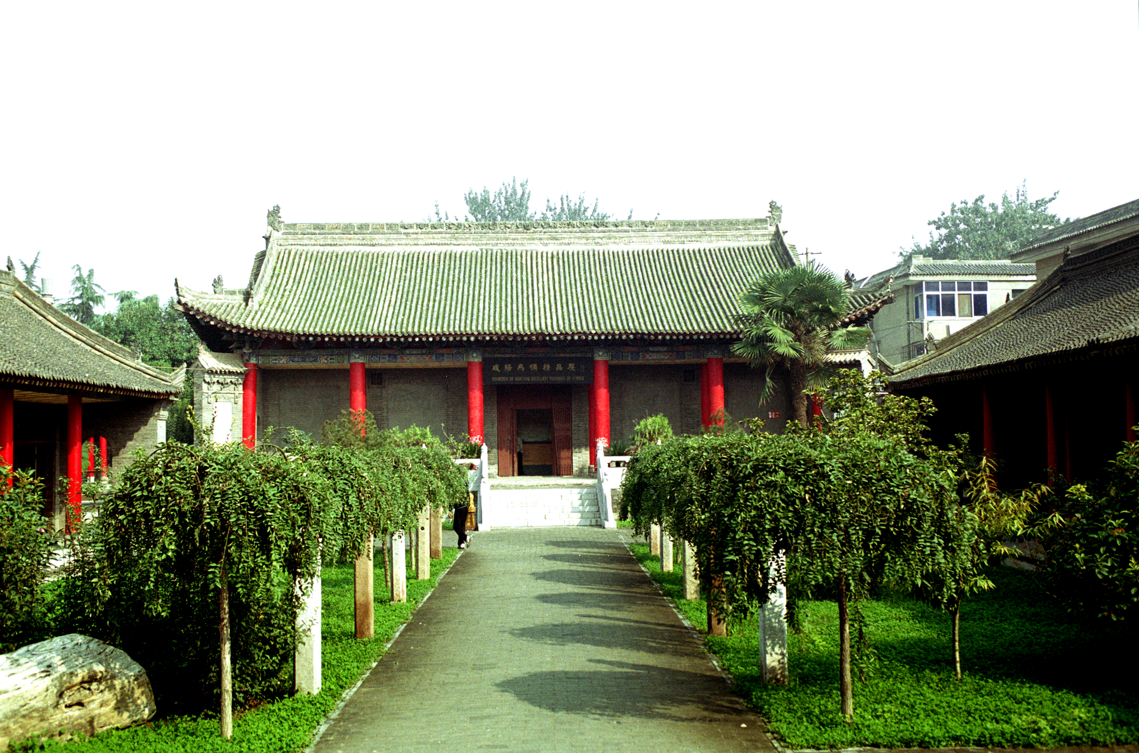 咸阳马俑展览馆